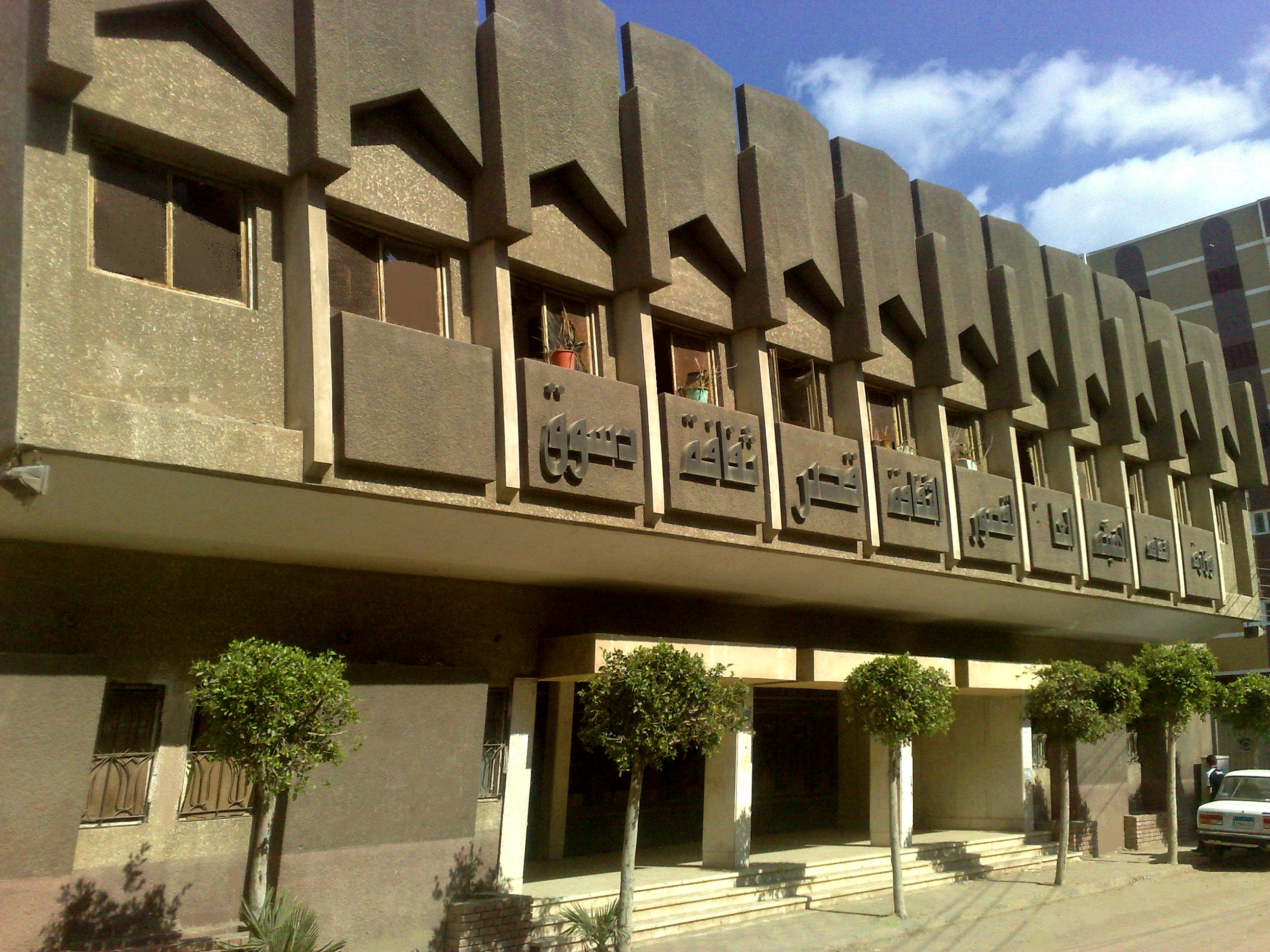 قصر ثقافة دسوق، مصر